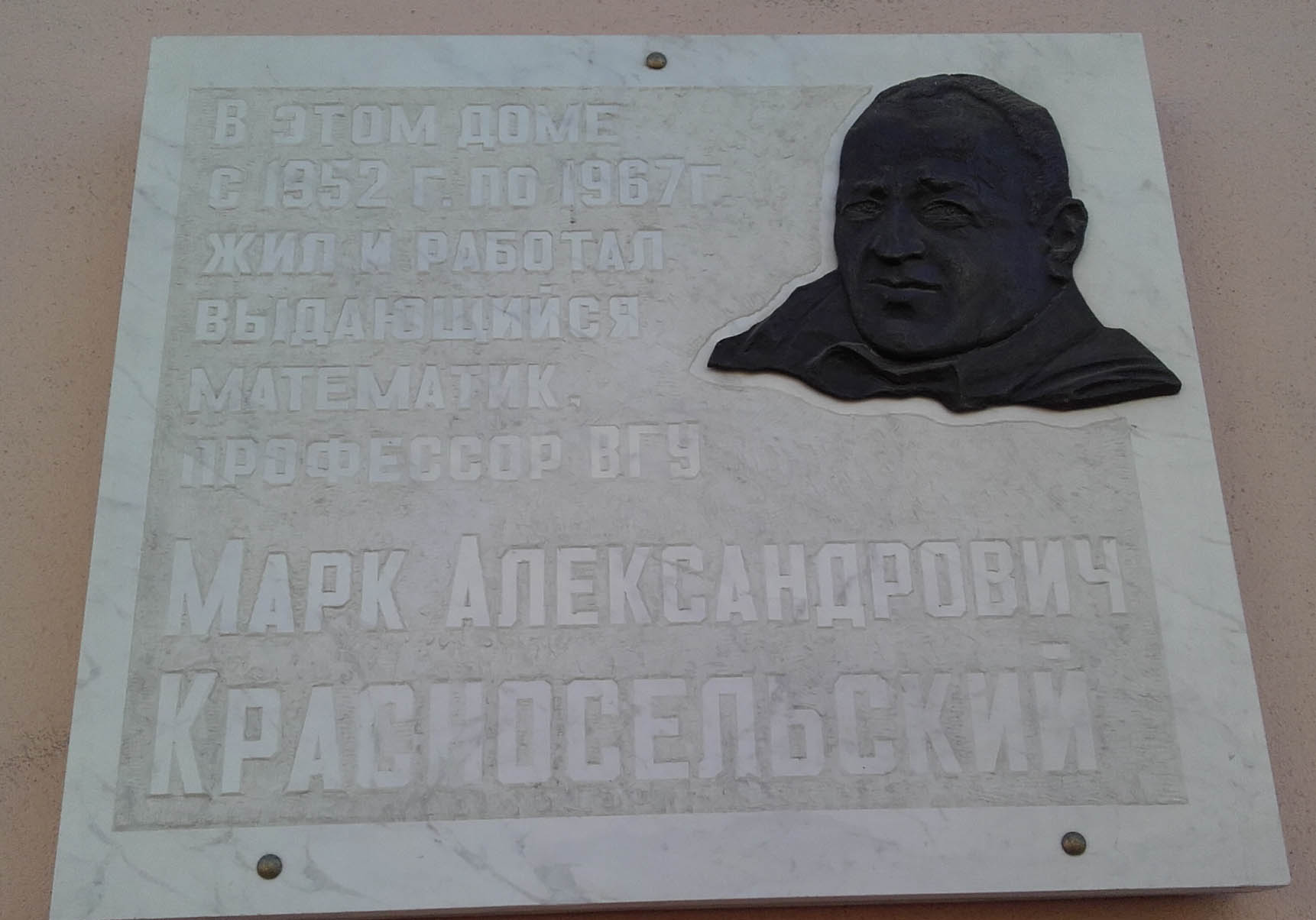 Мемориальная доска математику Марку Красносельскому